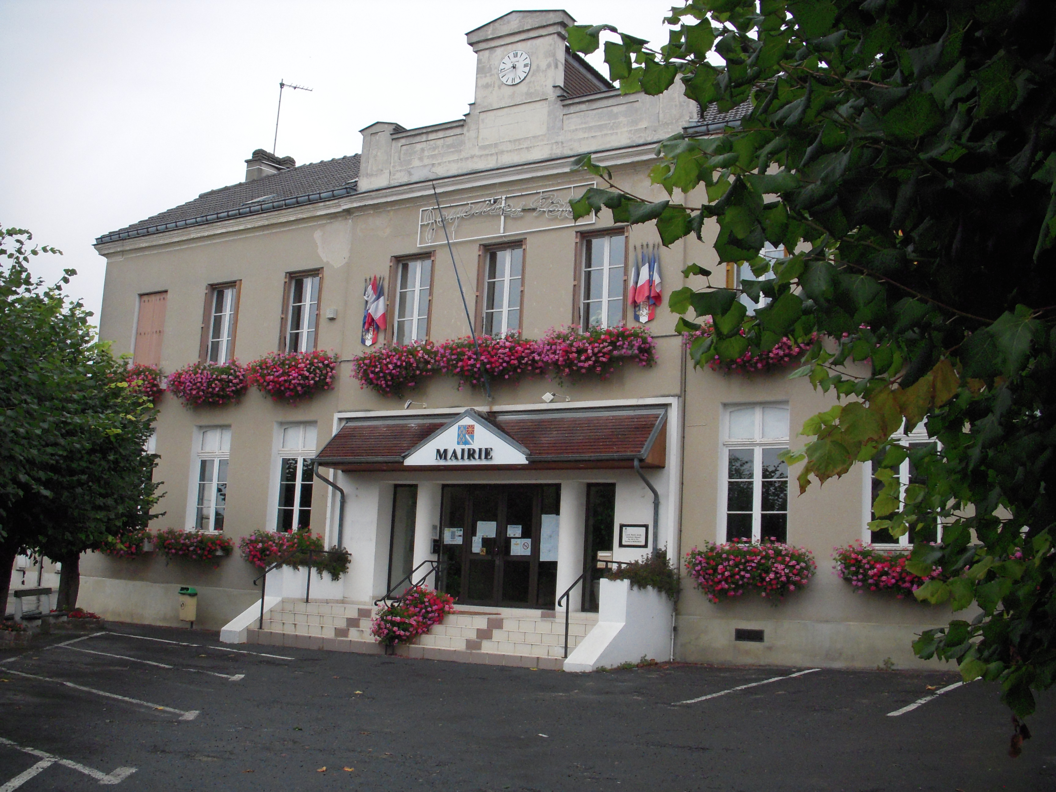 Mairie de Verneuil (Marne)